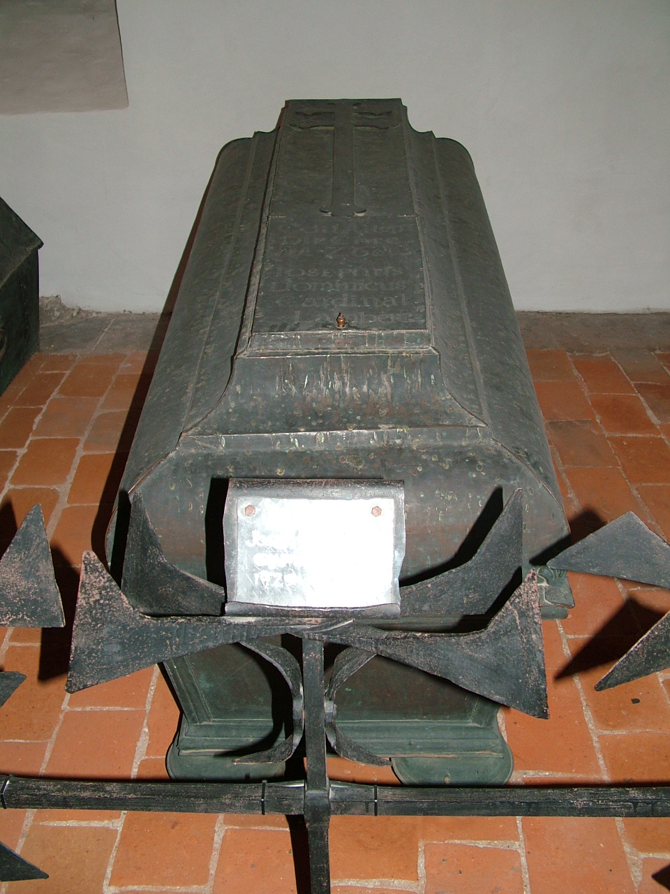 Sarg des Kardinals Joseph Dominikus von Lamberg in der Bischoftsgruft des Passauer Doms